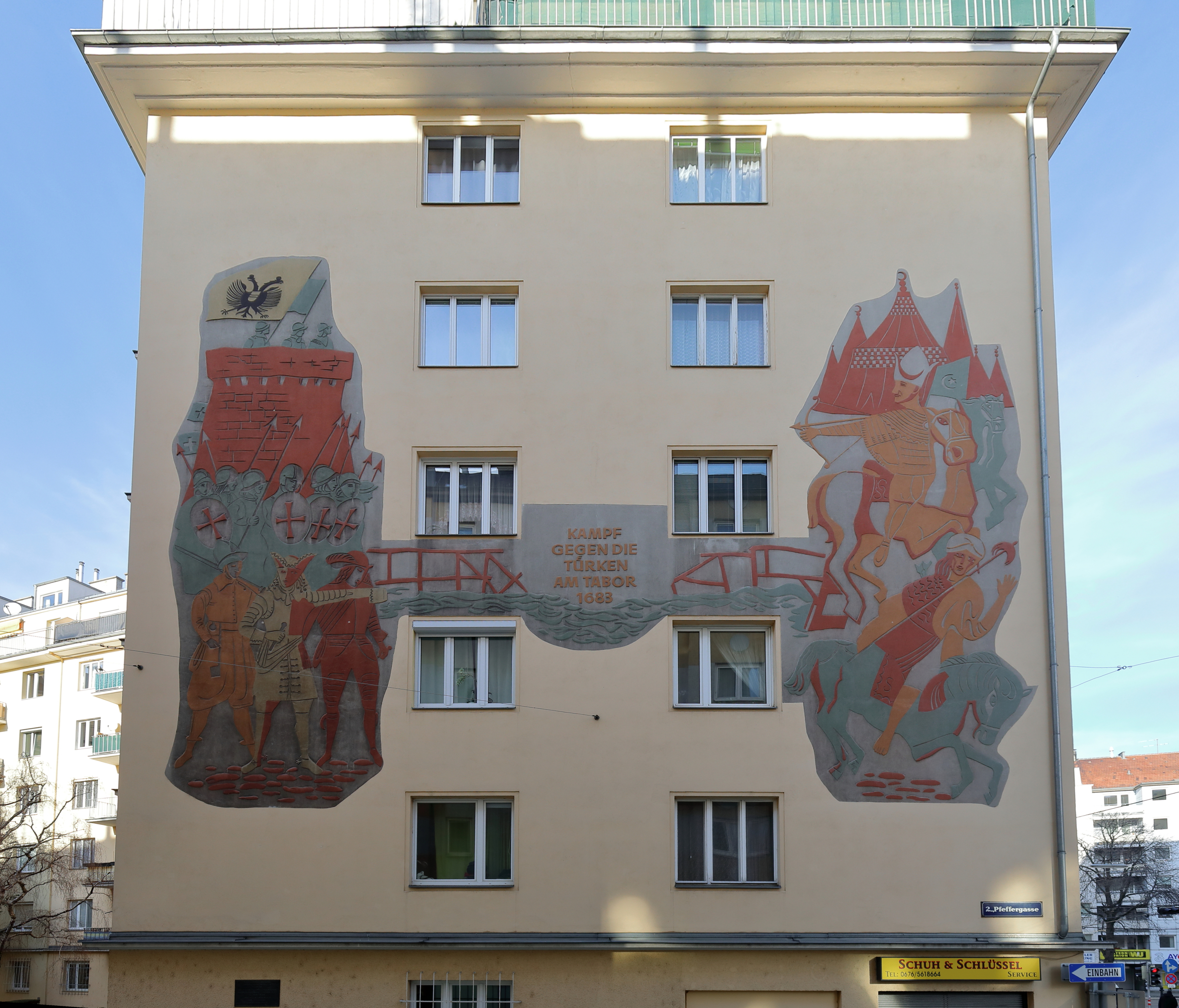 Sgraffito „Kampf gegen die Türken am Tabor 1683“ am Haus an der Adresse Pfeffergasse 3 im 2. Wiener Gemeindebezirk Leopoldstadt. Ein Kunstwerk aus dem Jahr 1958 des österr. Künstlers Hans Wulz.